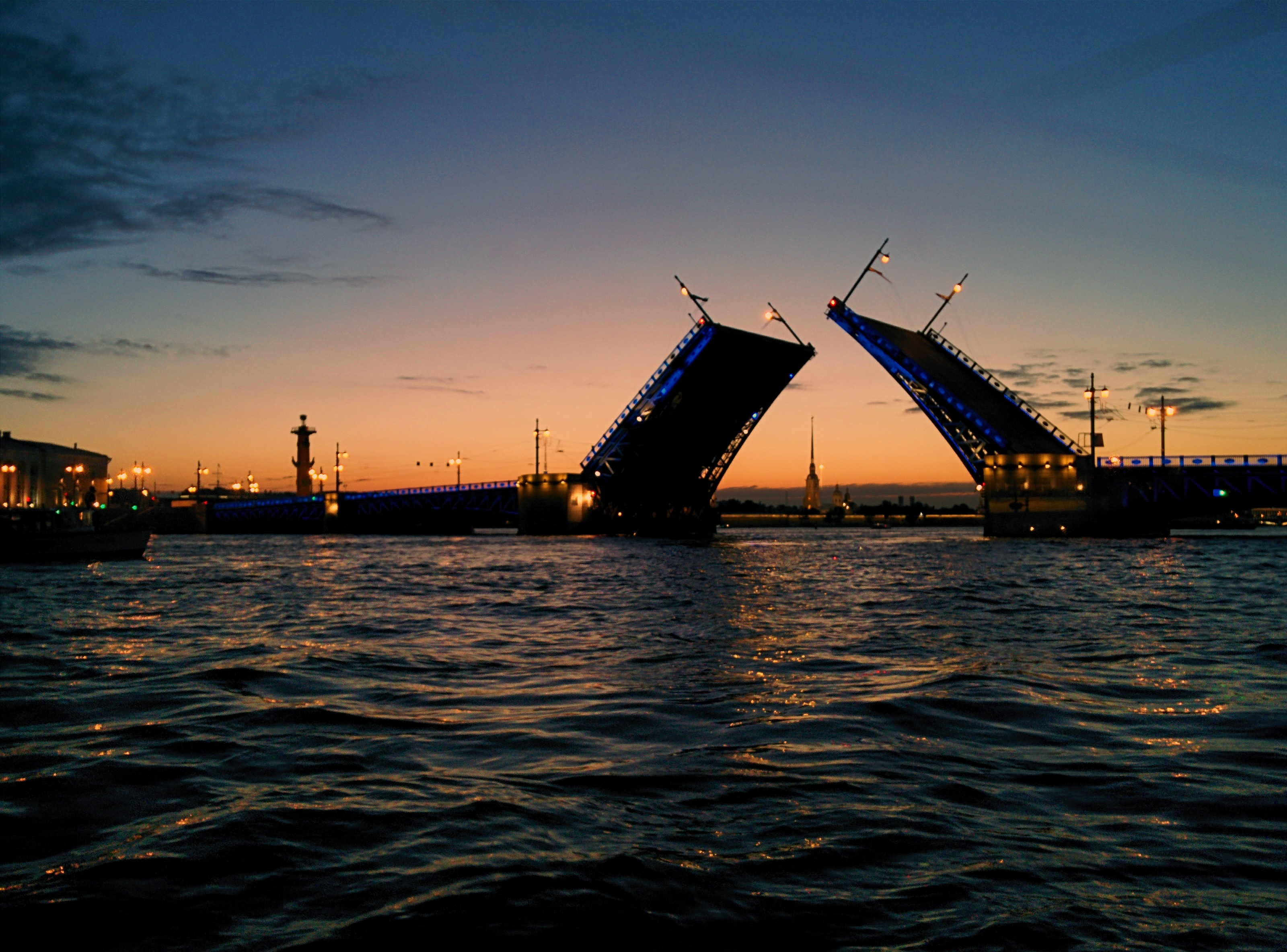 Мост Дворцовый: через р. Неву, соединяет Дворцовую площадь и Васильевский о-в, Центральный район, Санкт-Петербург